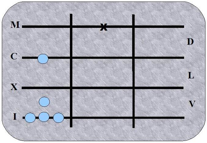 Schema eines Rechenbretts, dargestellt ist die Römische Zahl CVIII (108)